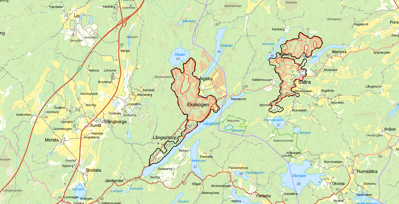 Tätorten Ekskogen och Långsjötorp med gränserna från Statistiska centralbyråns tätortsavgränsning 2015 i svart och småorten Ekskogen och Älgeby från småortsavgränsningen 2010 i rött. Bakgrundskarta från Lantmäteriet, skala 1:30 236. På kartan syns även tätorten Sättra.